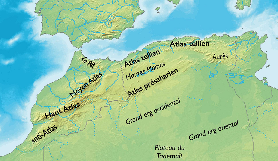 Carte orographique de l'Afrique du Nord occidentale (Maghreb) indiquant la position des monts Atlas (Anti-Atlas, Haut Atlas, Moyen Atlas, l'Atlas présaharien et l'Atlas tellien) ainsi que l'Aurès, les Grands ergs occidental et oriental, les Hautes Plaines et le Plateau du Tademaït.